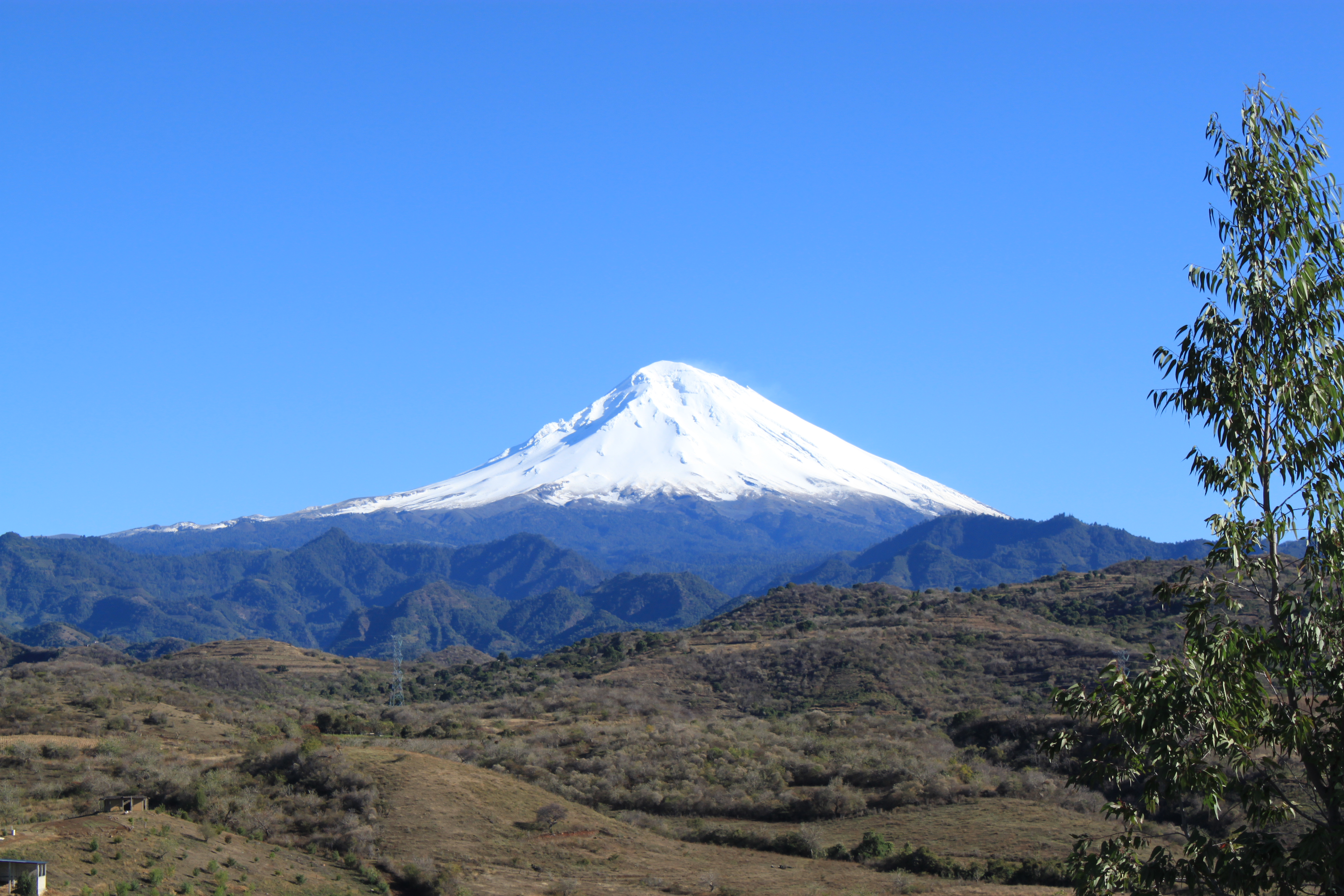 Popocatepetl visto desde Tlacotepec, Morelos, México.